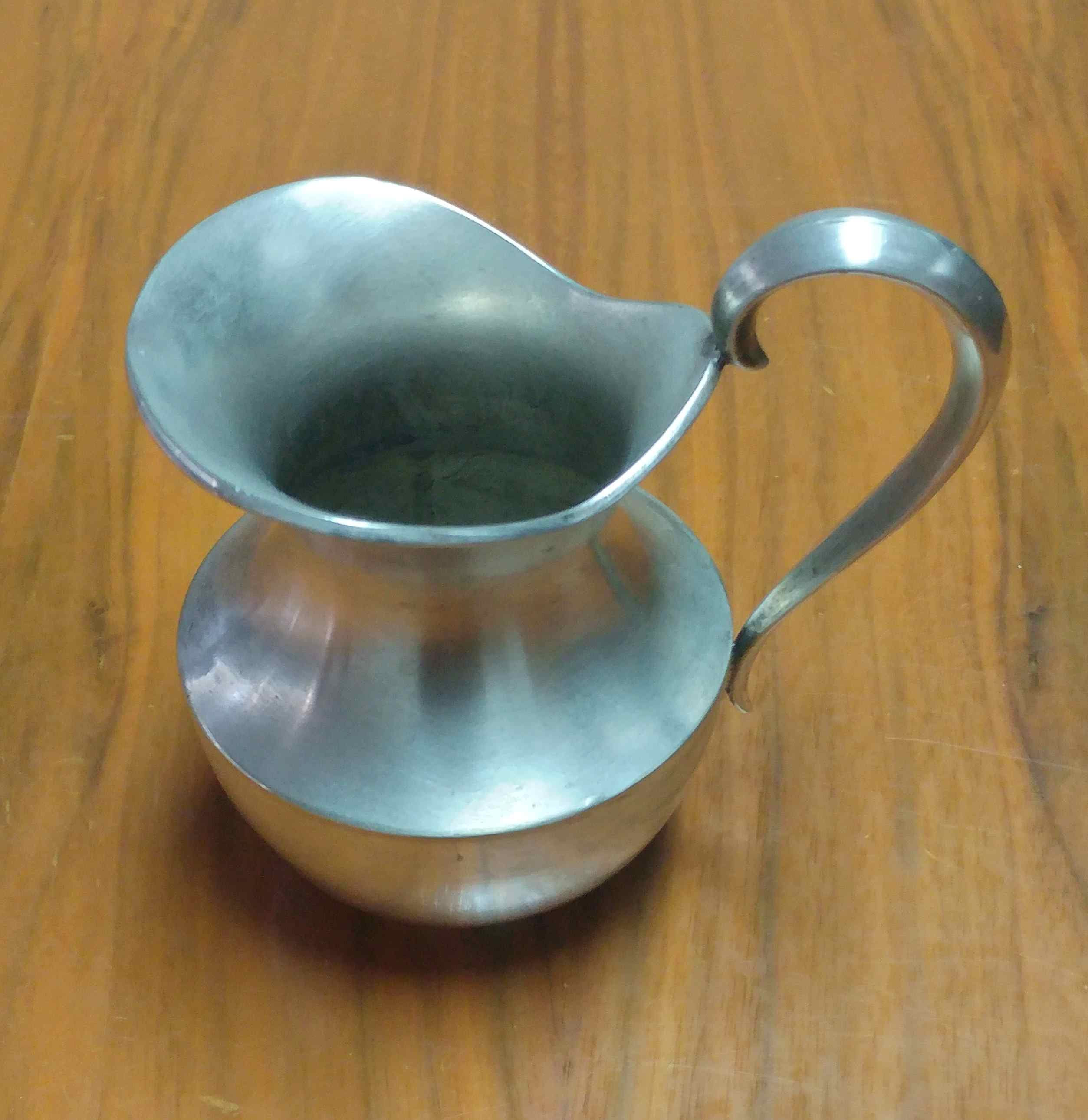 Jarra de los años 30 del siglo XX. Tiene un diseño simple adecuado a su función, como propugna el art-déco.